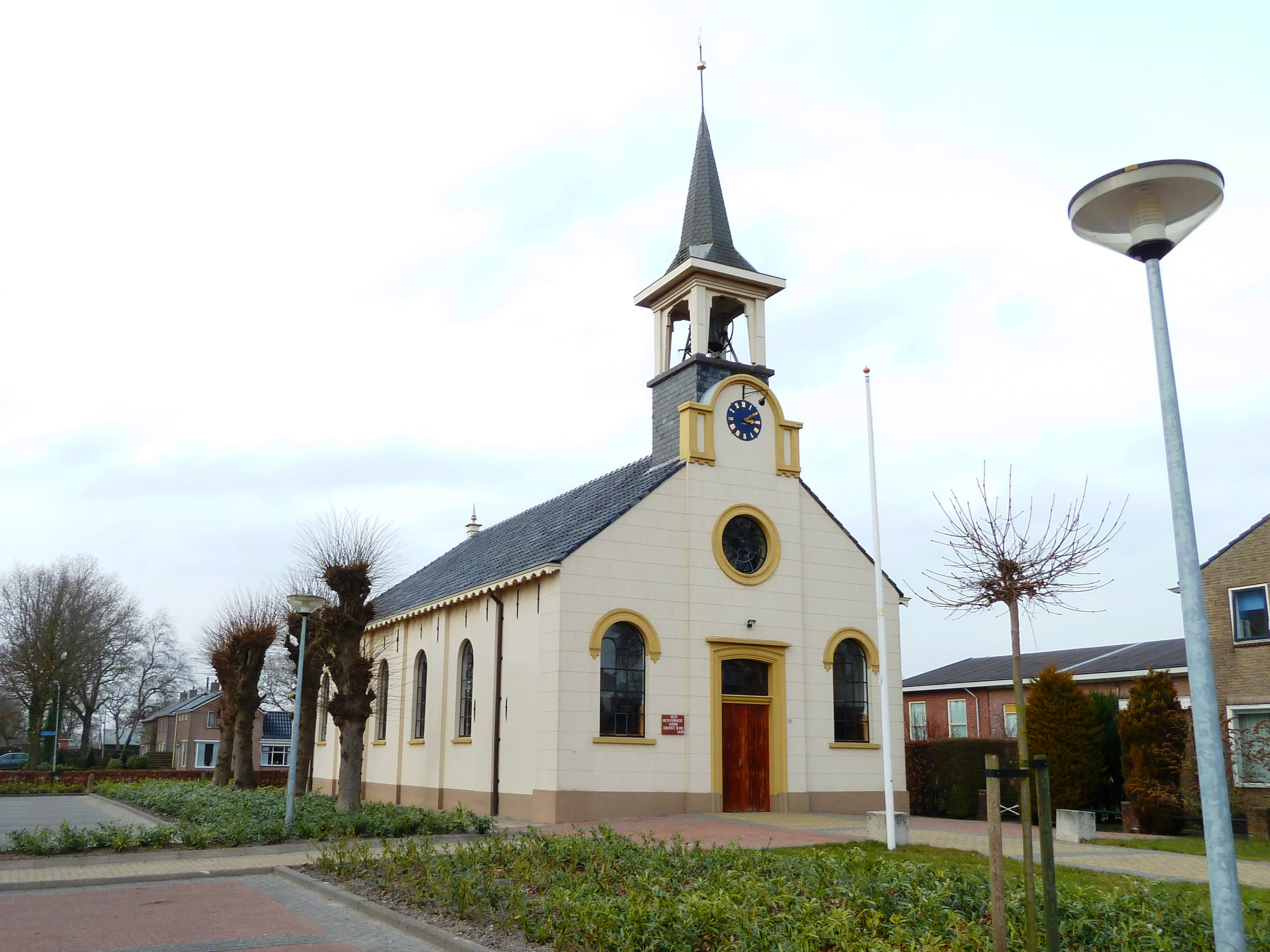 Hervormde kerkje van Zevenhuizen (Leek, Groningen, Nederland) uit 1869.